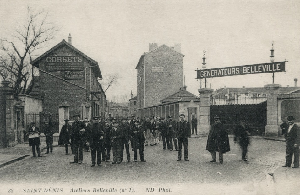 Saint-Denis, ateliers Belleville, carte postale ancienne exempte de droits d'auteur.